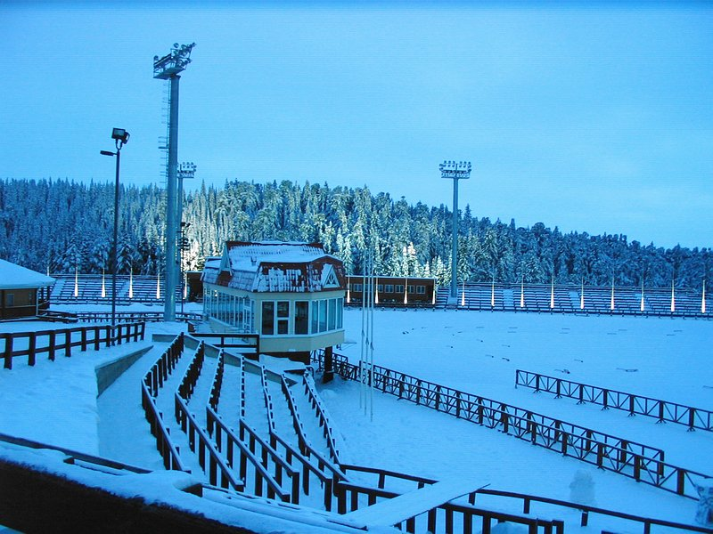 Биатлонный центр в Ханты-Мансийске